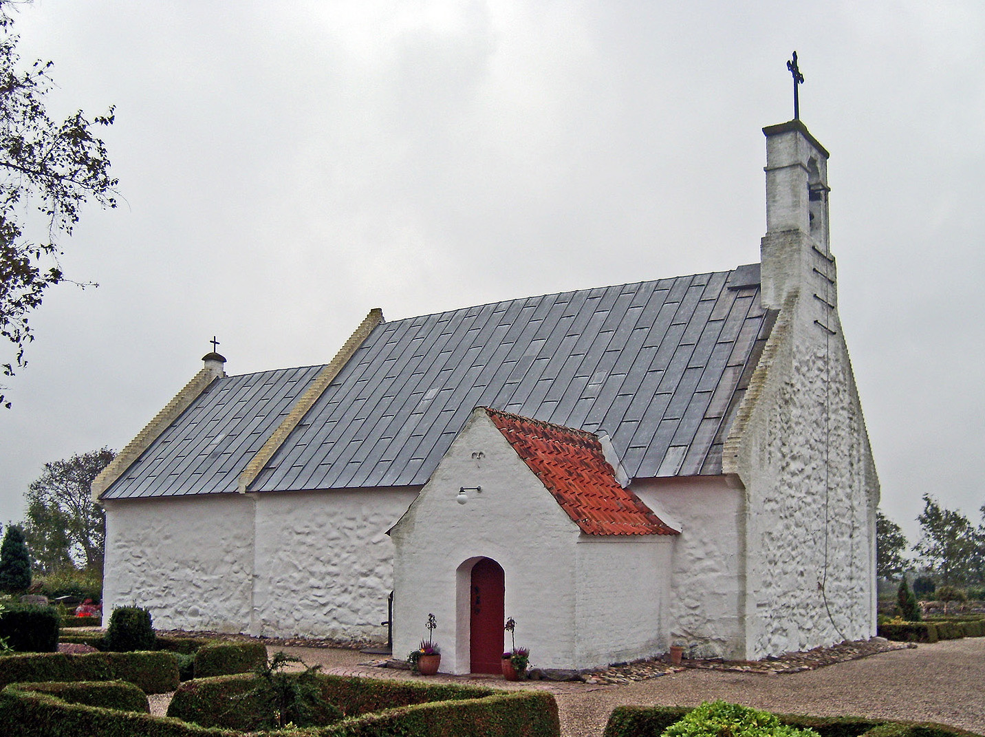 fra nordvest